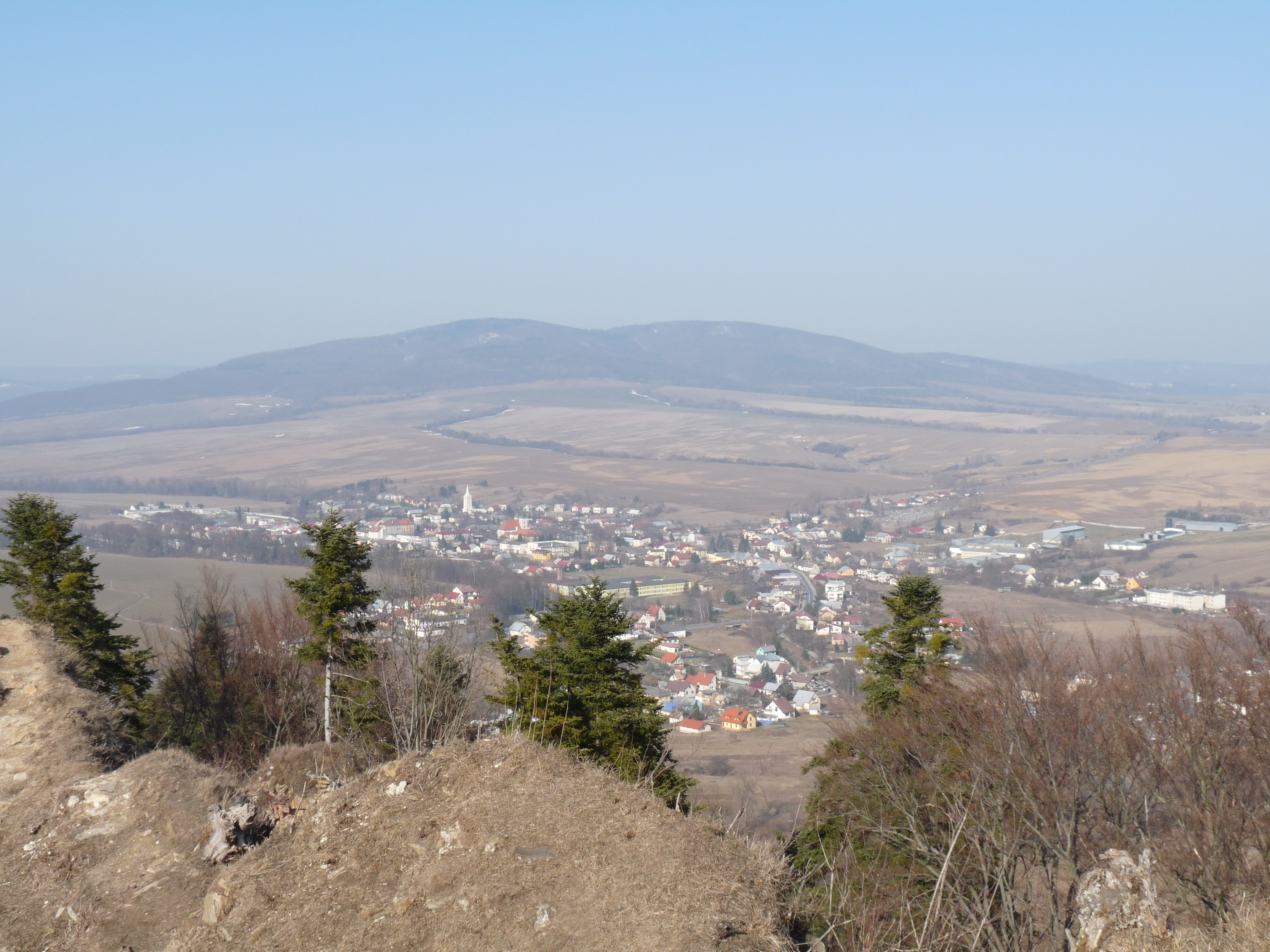 Výhľad na dedinu Zborov zo Zborovského hrzdu